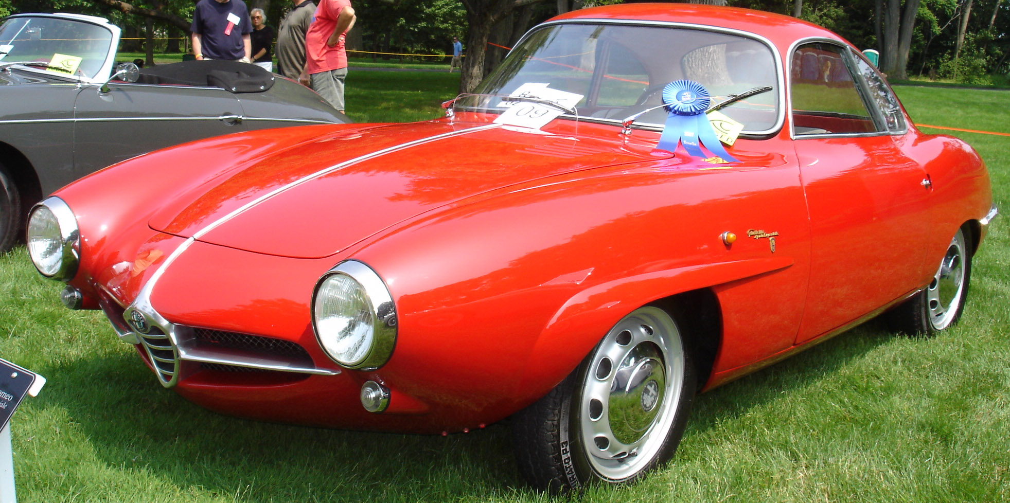 Alfa Romeo Guilietta Sprint Speciale